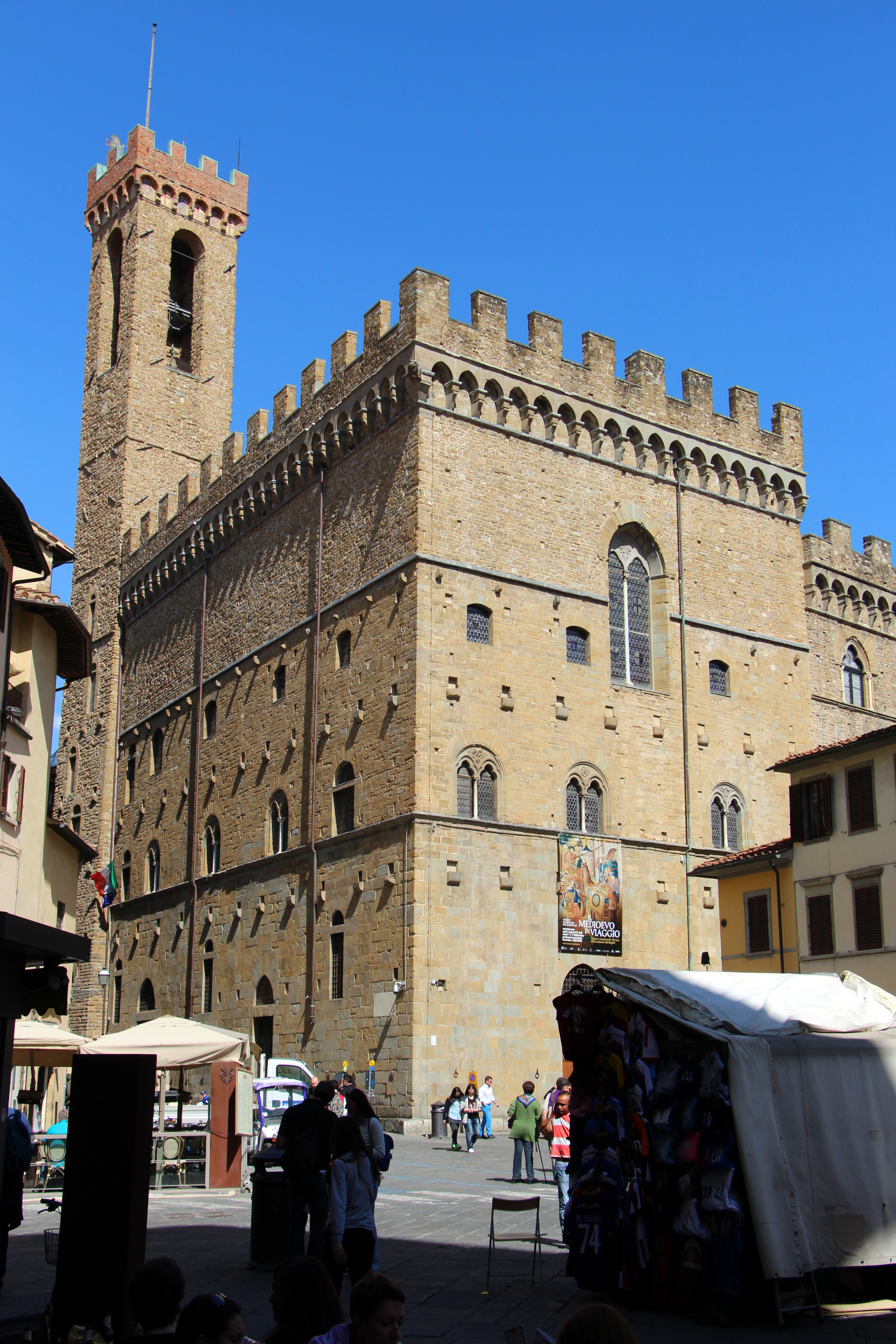 Firenze, miscellanea